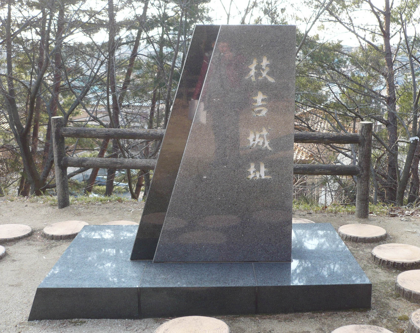 枝吉城の石標